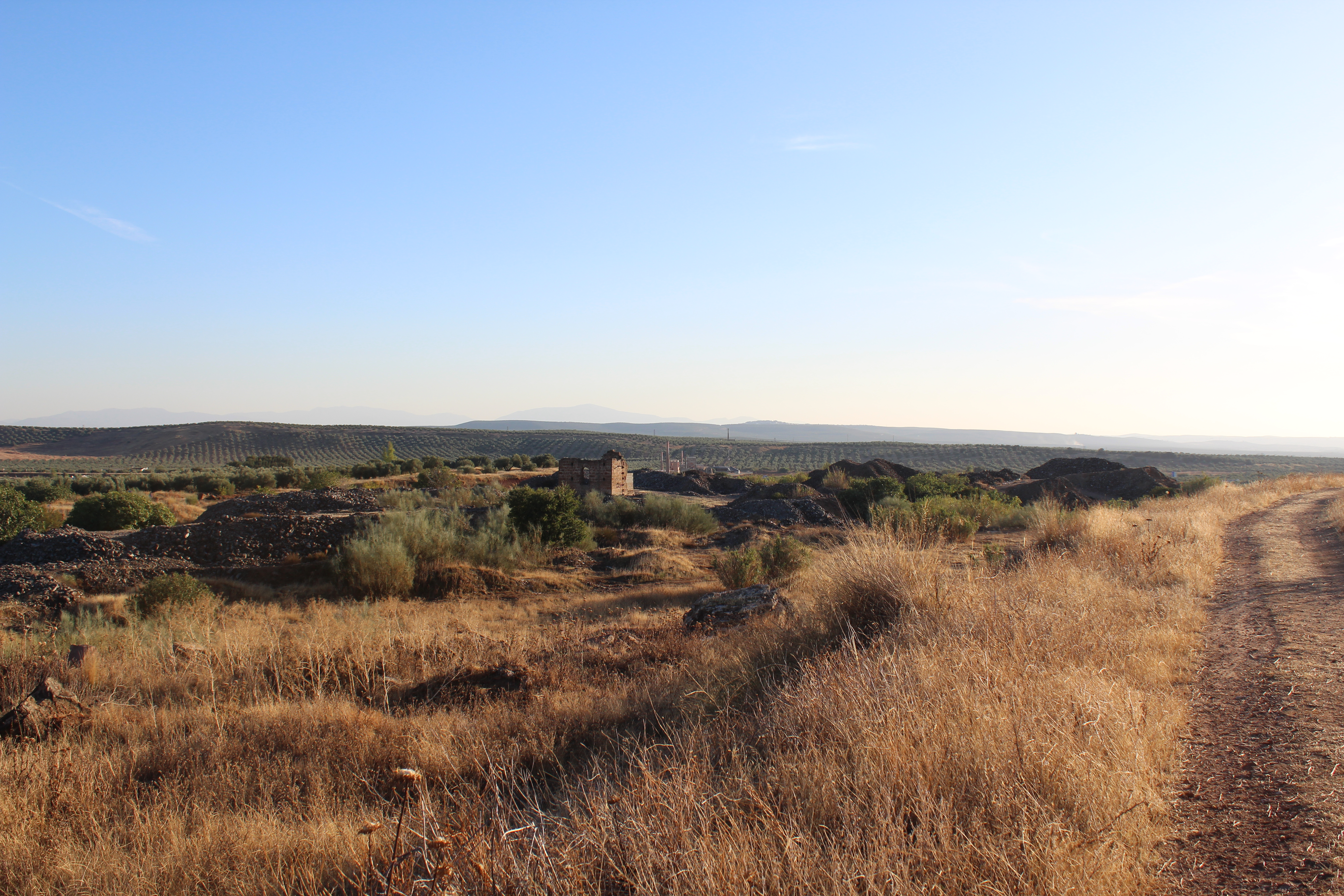 Vista lejana de Linares desde La Tortilla.